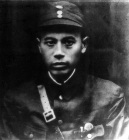 涂正坤（1897年11月－1939年6月12日），原名涂正生，湖南平江人，中國共產黨軍事將領。